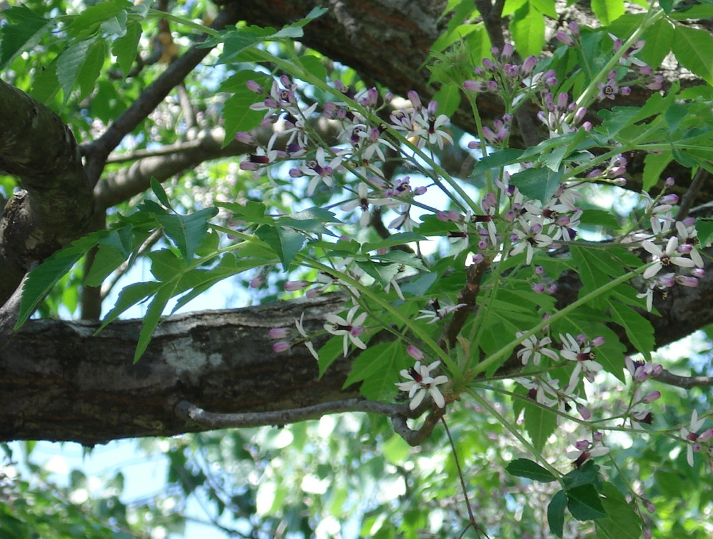 Infiorescenza di Melia azedarach